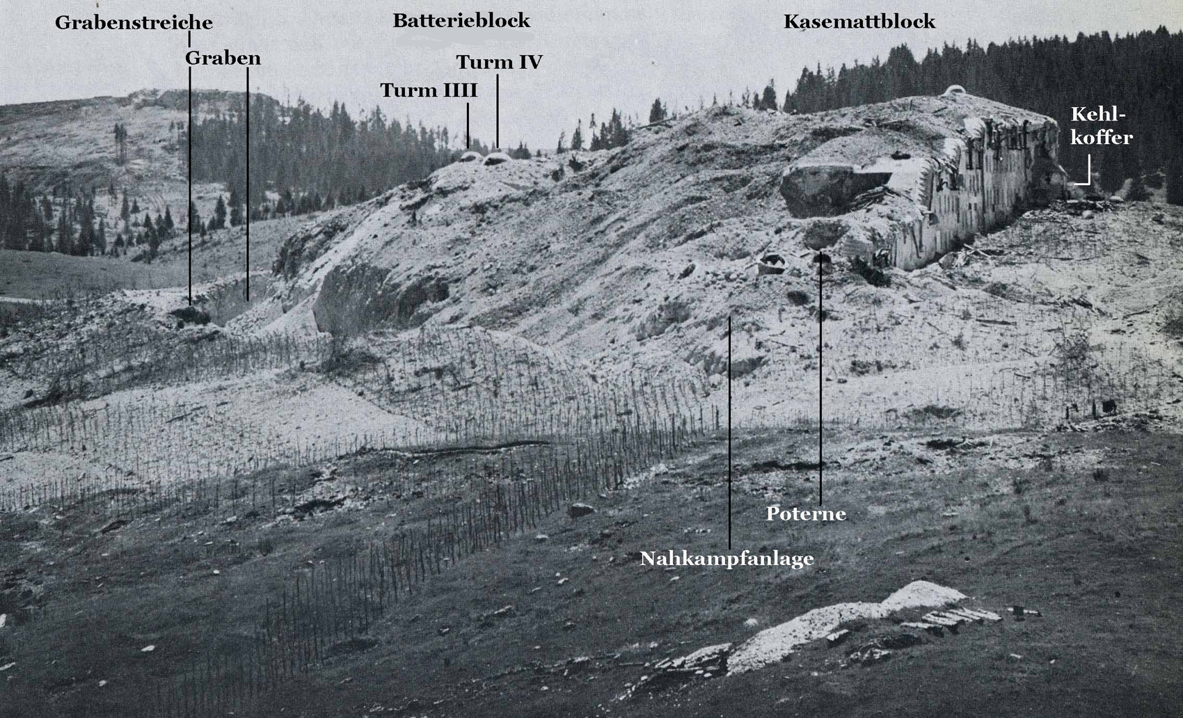 Werk Verle: vom Stpt.48, links Flanke zerstört, Panzerkuppel am Schutt liegend, links Werk Lusern sichtbar.